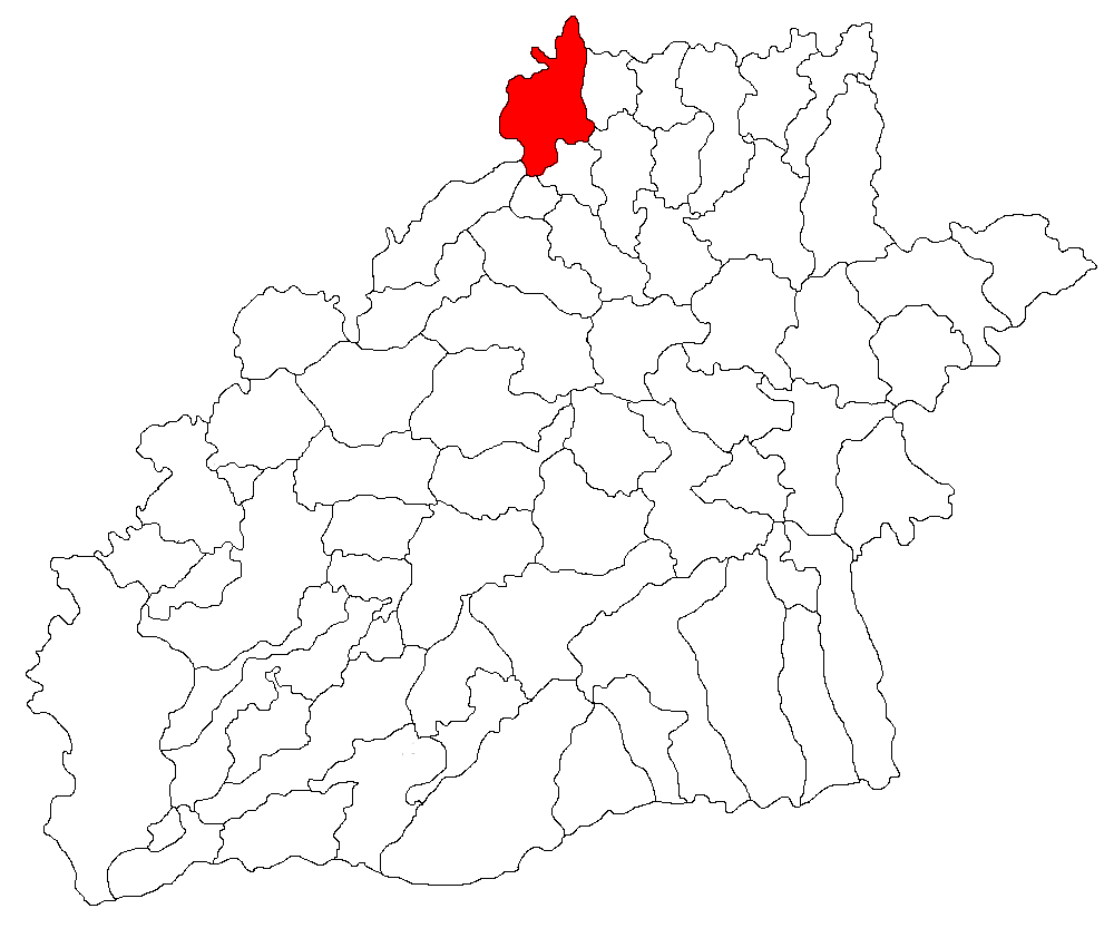 Categorie:Hărţi ale judeţului Sibiu